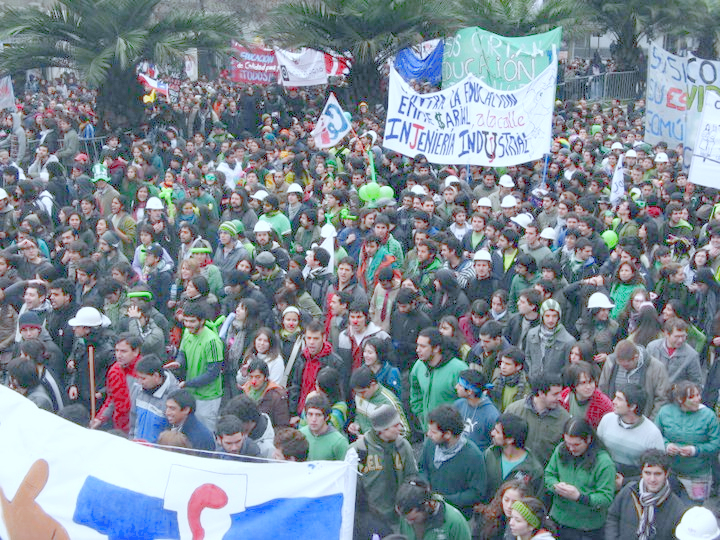 Estudiantes de la Facultad de Ciencias Físicas y Matemáticas de la Universidad de Chile marchando por la Alameda